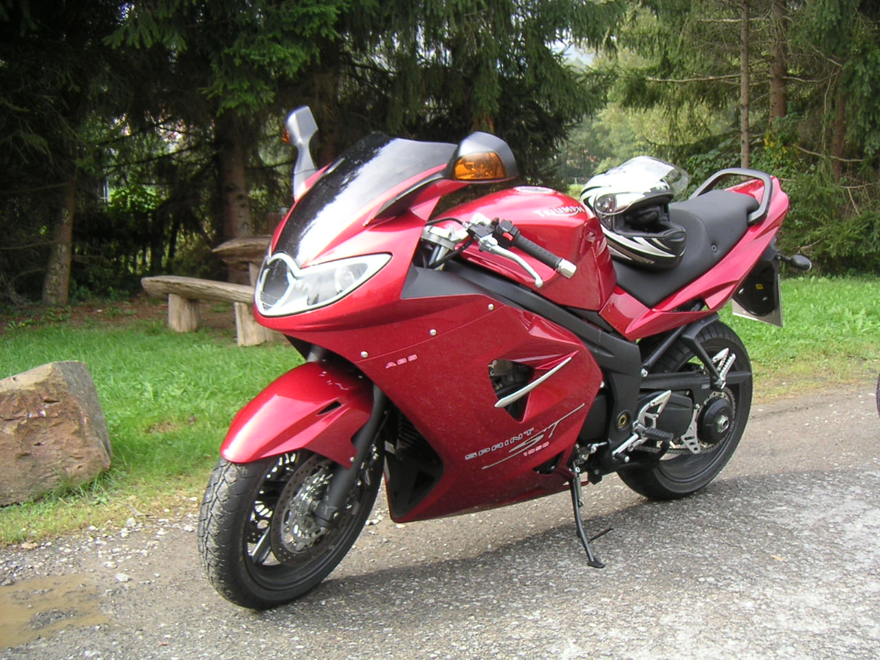 Bild einer Triumph Sprint ST 1050 Baujahr 2006